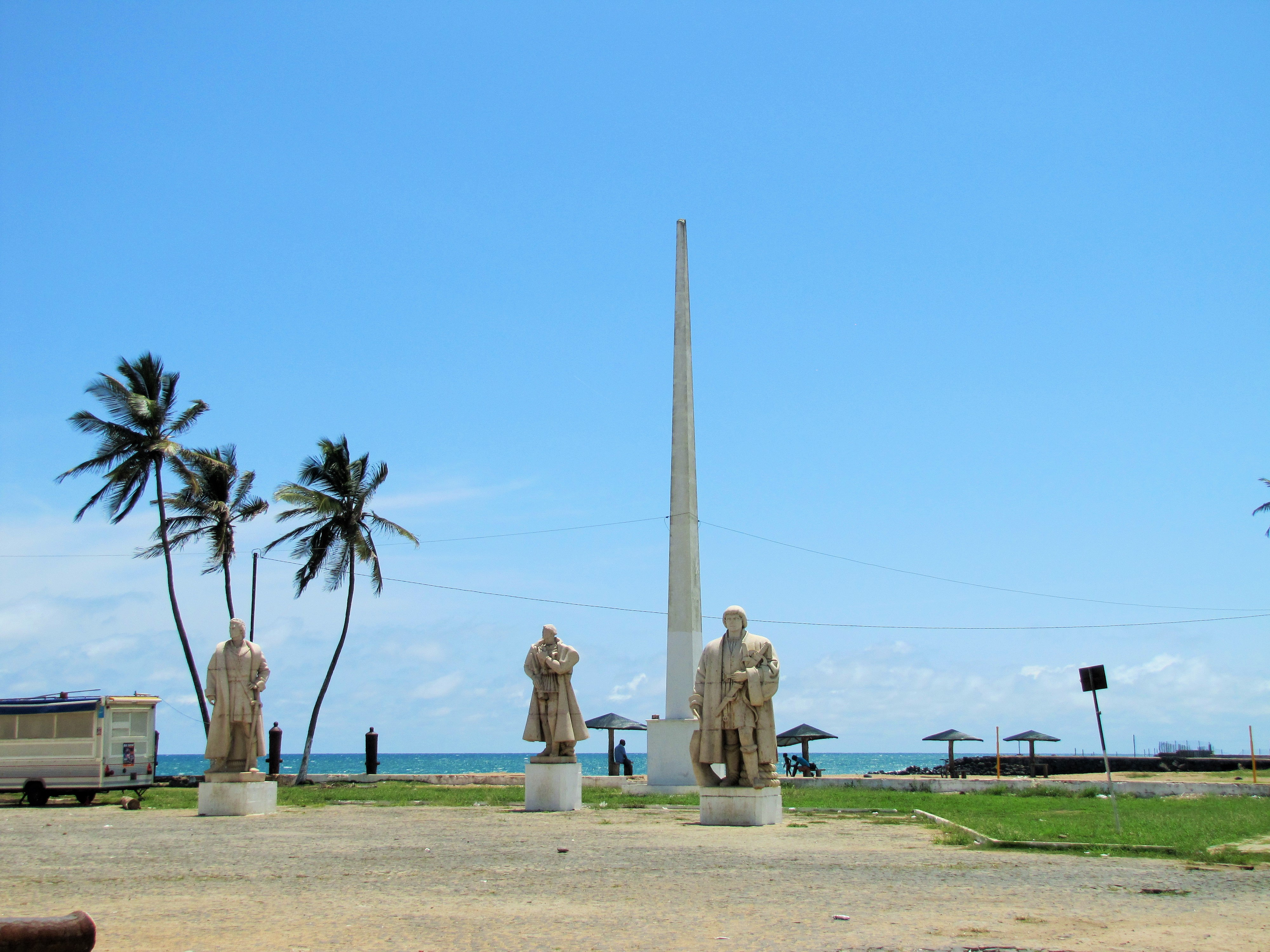 Sao Tome Explorers Statues 3